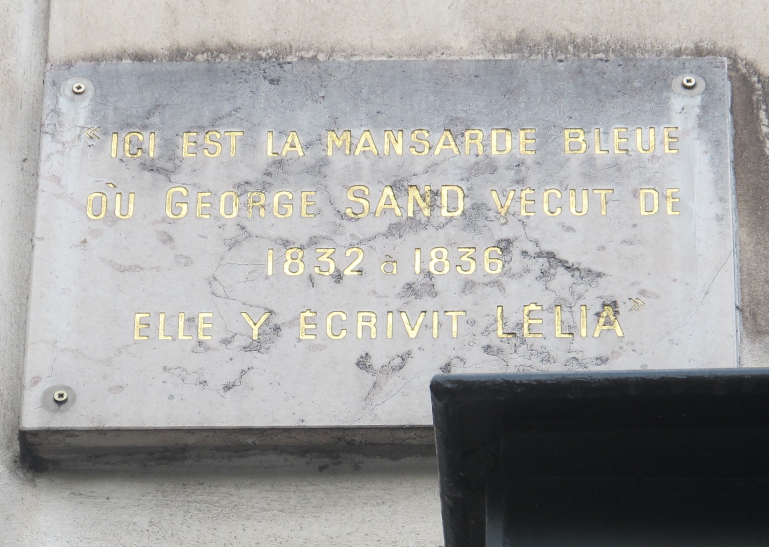 Plaque en hommage à George Sand, 19 quai Malaquais (Paris, 6e) : "Ici est la mansarde bleue où vécut Georges Sand de 1832 à 1836 ; elle y écrivit Lélia".